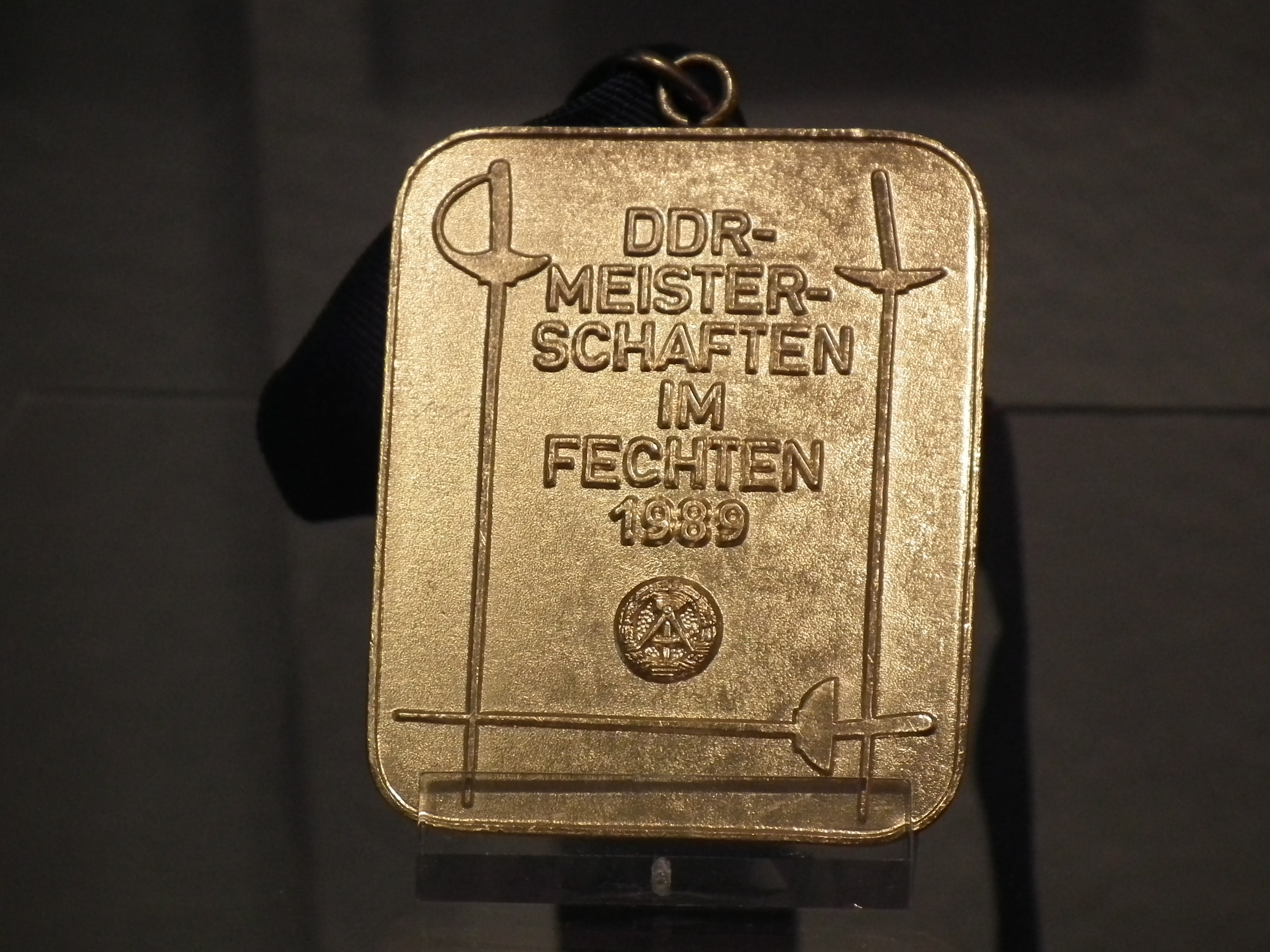 2019-09-14 Stadt- und Waagenmuseum Oschatz